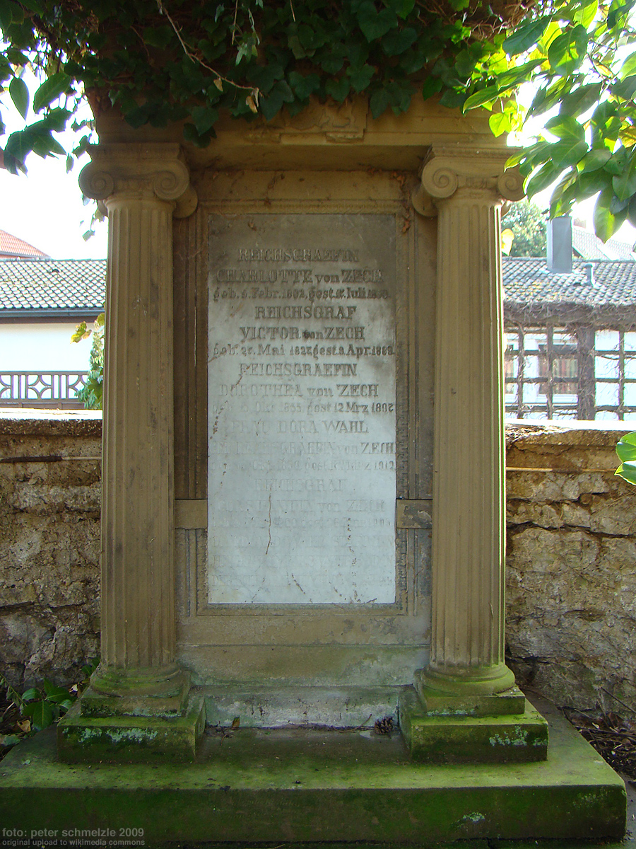 Grabmal der Reichsgrafen von Zech in Bad Friedrichshall-Kochendorf